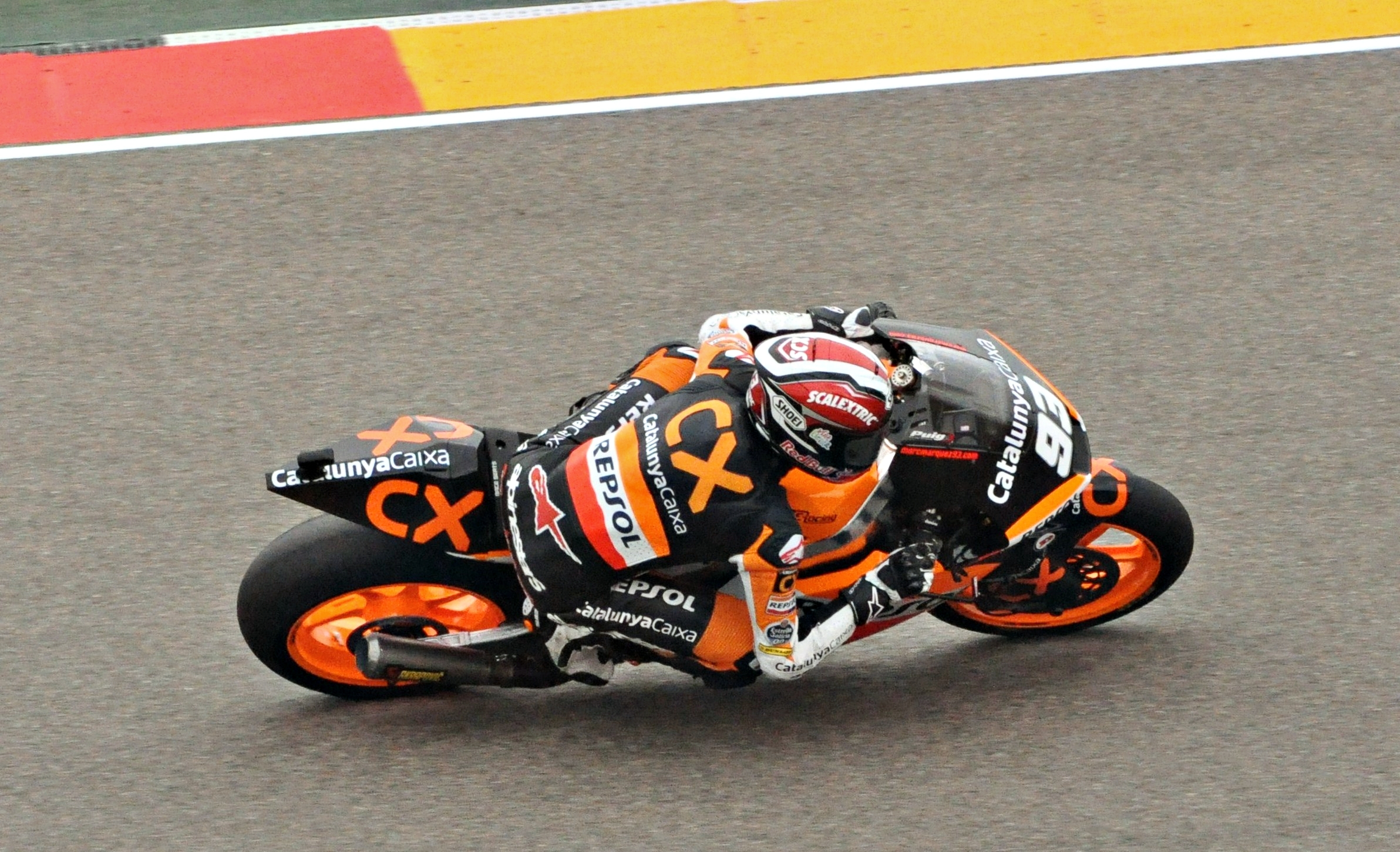 gran premio de cataluña